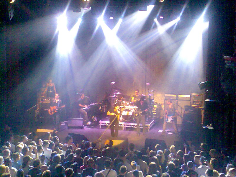 INXS juin 2007